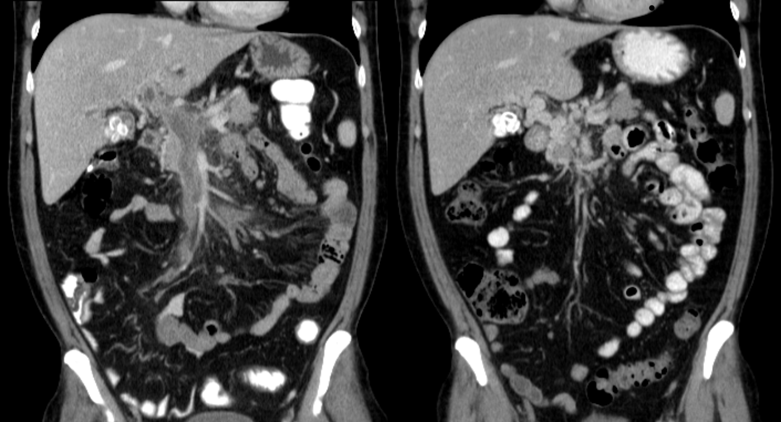 Pfortaderverschluss in der Computertomographie und (rechts) kavernöse Transformation der Pfortader nach ca. 1 Jahr. In der Vorgeschichte hatte der Patient eine Lungenembolie erlebt.